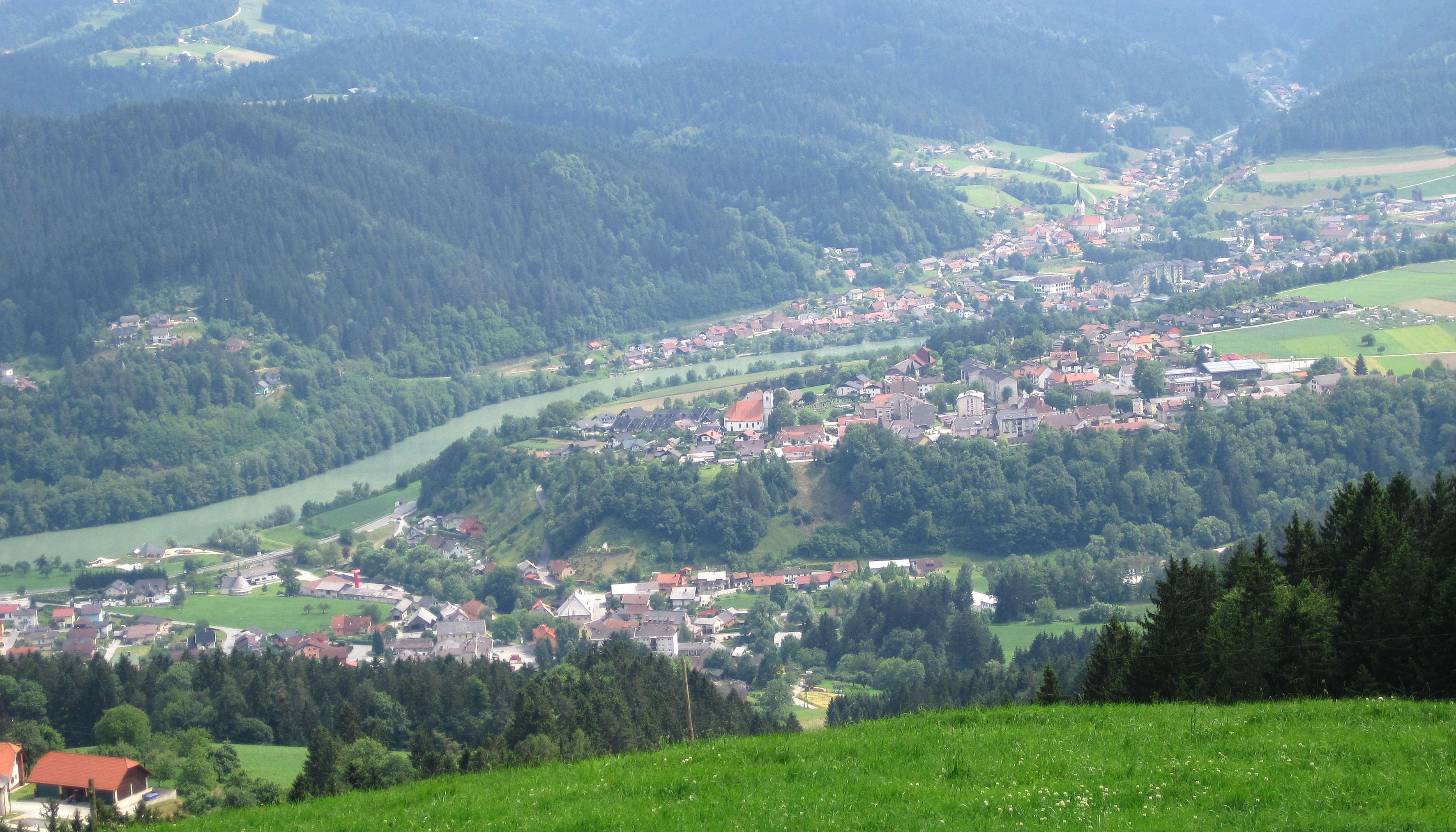 Muta in Vuzenica iz Sv.Primoža